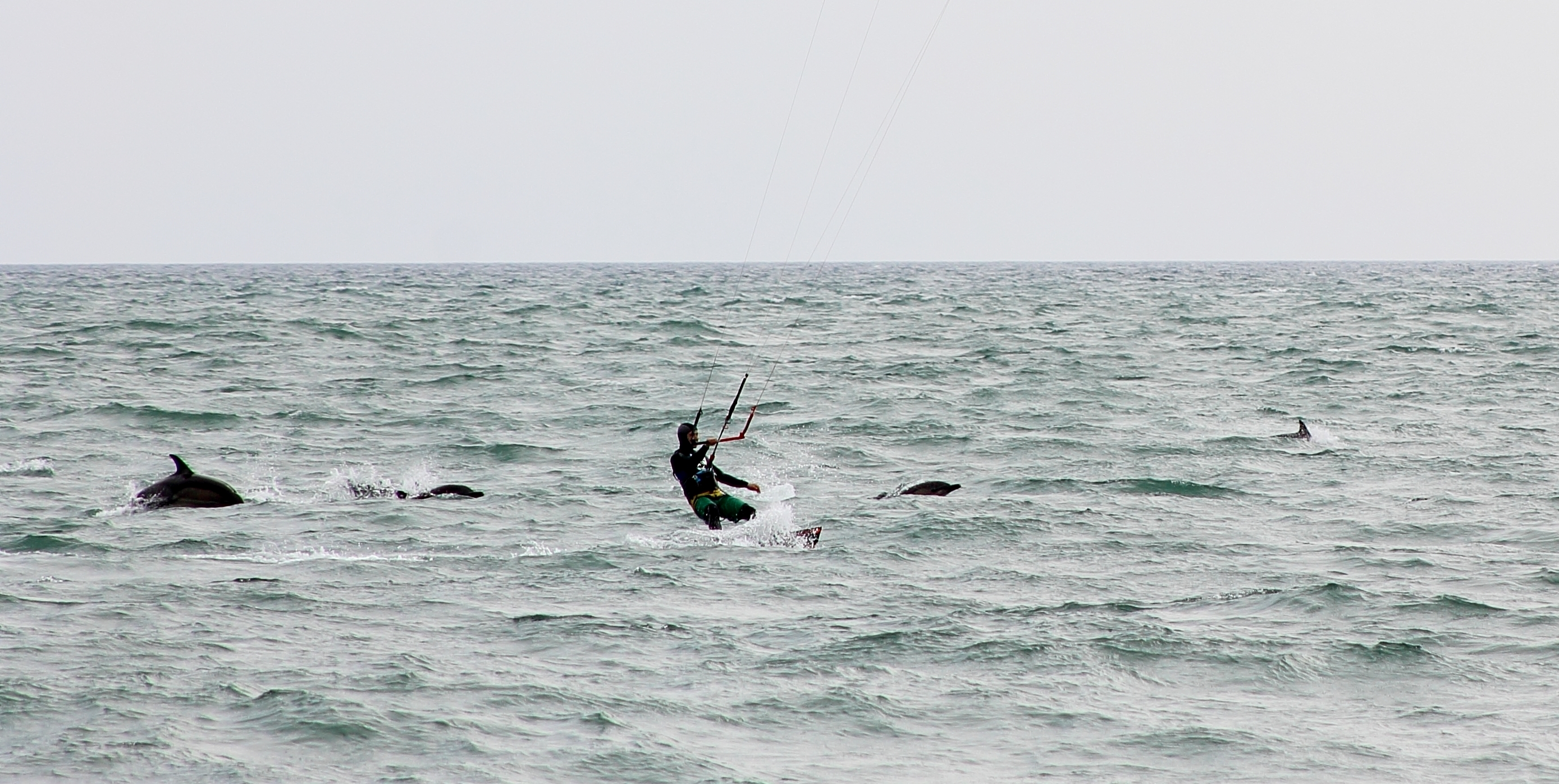 Кайтсёрфер и дельфины в открытом море.